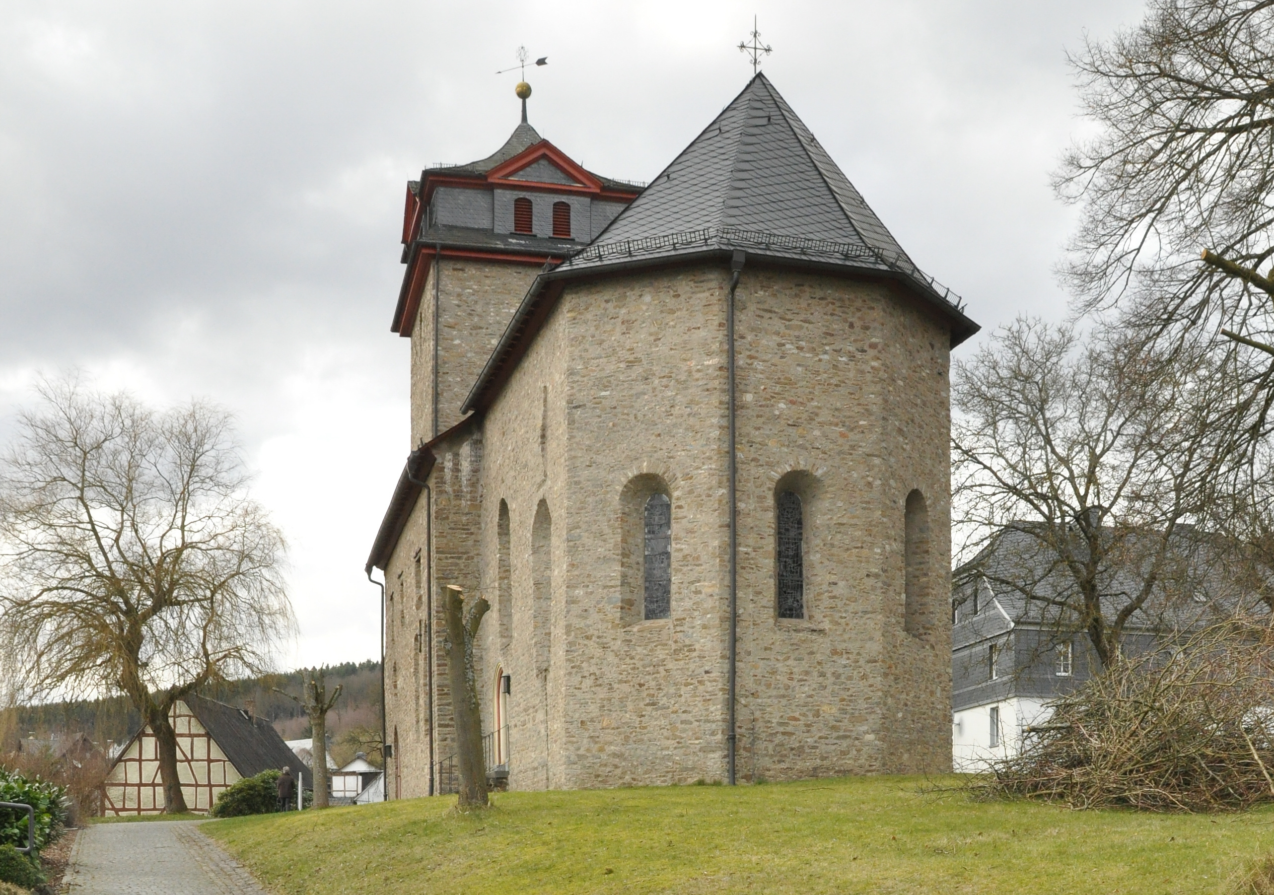 Chor, Ansicht von Osten